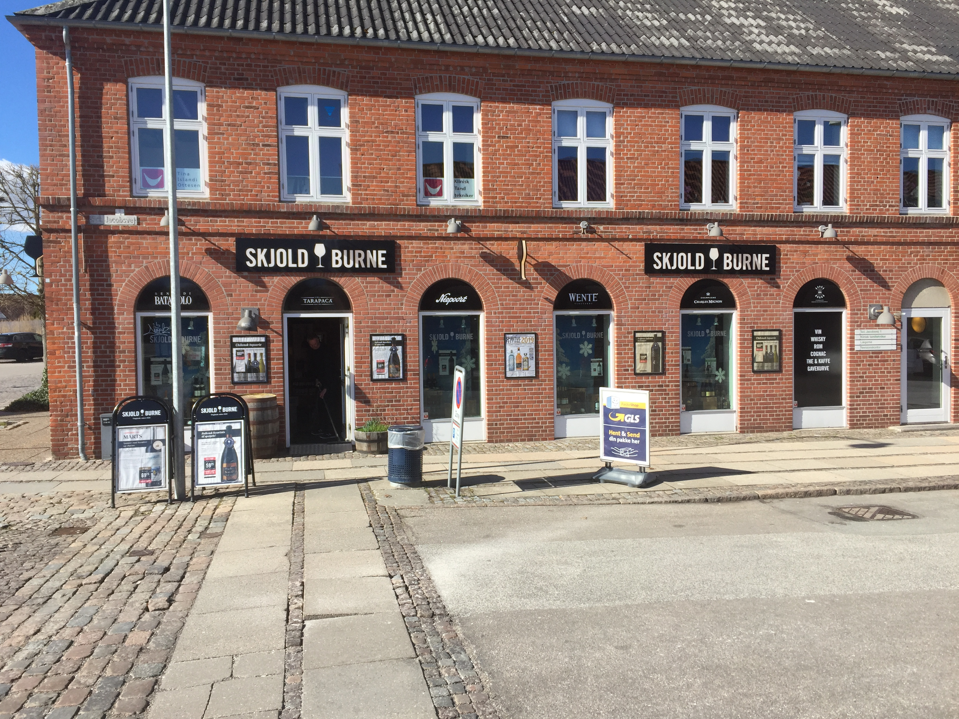 Skjold Burne, Sankt Jacobsvej 1, 2750 Ballerup